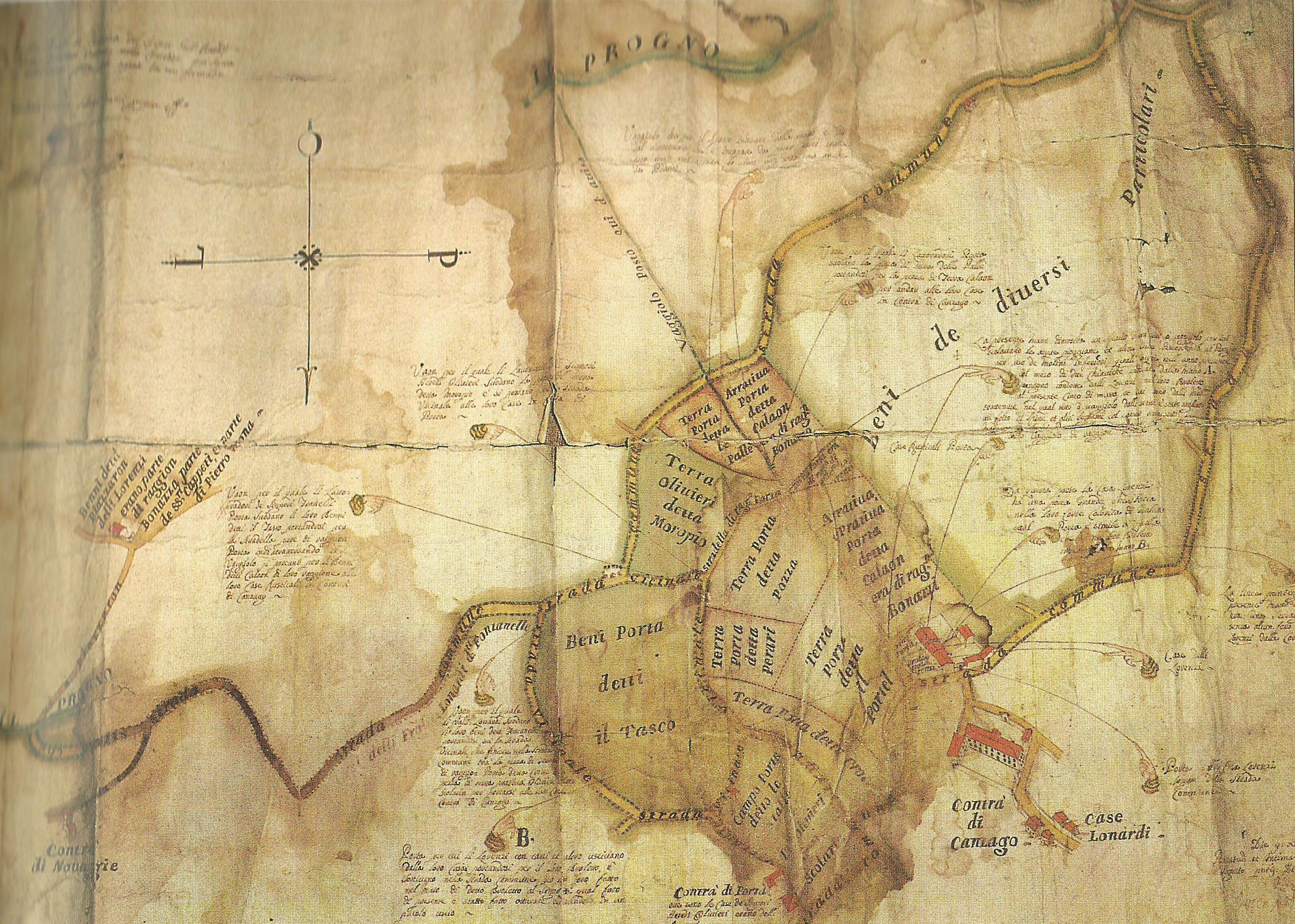 Mappa della contrada di Canzago, vicino all'odierna Marano di Valpolicella, nel settecento.